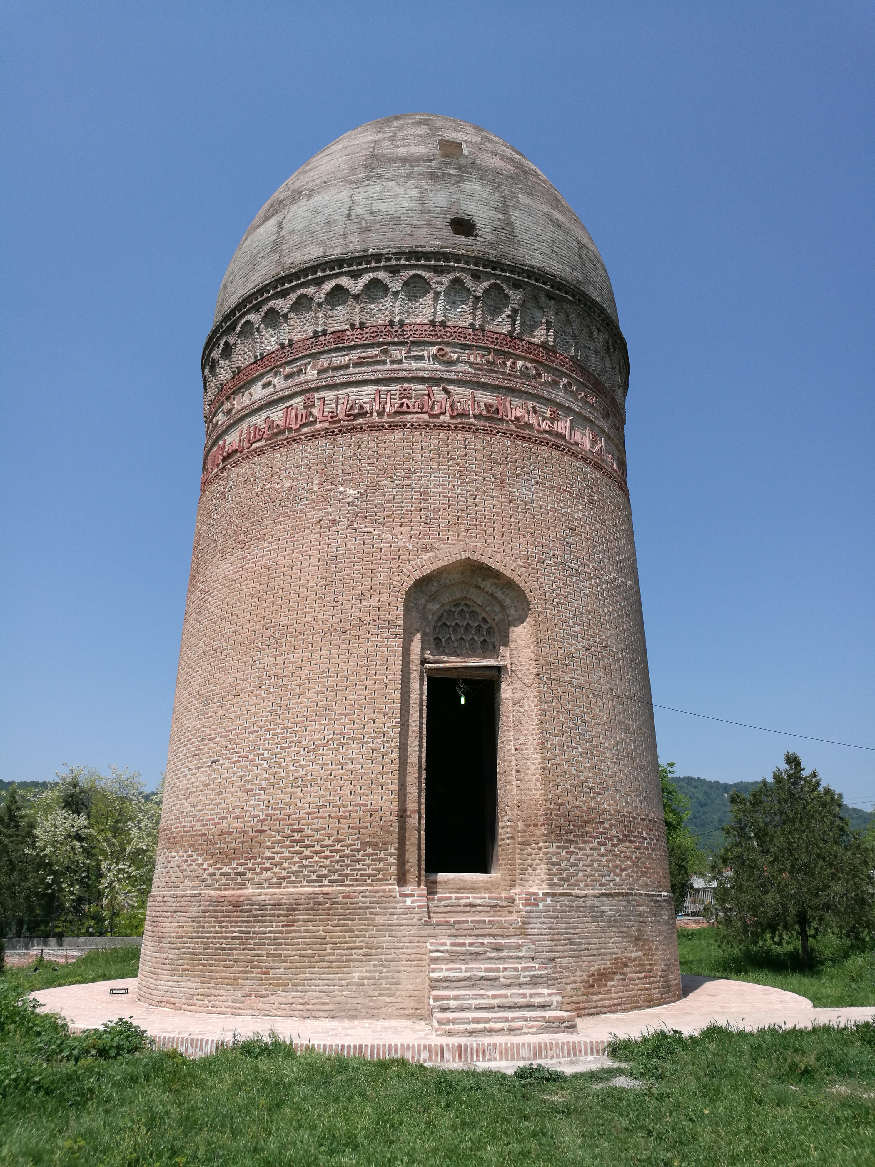 برجی آرامگاهی مربوط به دورهٔ باوندیان در منطقه امامزاده عبداله روستای لاجیم سوادکوه که در سال ۴۱۳ ه.ق به دستور چهرزاد دختر سیسپور ساخته شد و محل دفن شاه شهریار بن عباس بن شهریار است. این برج قطری در حدود ۸ متر و ارتفاعی در حدود ۱۸ متر دارد و از آجر، ساروج، گچ و چوب ساخته شده است.